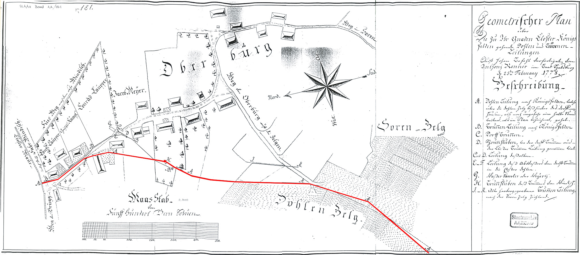 Windisch-Oberburg, Wasserleitungsplan aus dem Jahr 1778 von A. Renner Röm. Wasserleitung (rot), Dohlen und Brunnenzuleitungen nach Königsfelden Es handelt sich um die älteste bekannte planerische Darstellung der wasserführenden römischen / mittelalterlichen Wasserleitung von Vindonissa, die hier zusätzlich rot markiert ist Überschrift: "Geomterischer Plan über die zu Ihr Gnaden Closter Königsfelden gehenden Dohlen und Brunnen-Leitungen auf hohen Befehl verfertigt, von Anthonj Renner im Baad Habsburg den 25. February 1778".